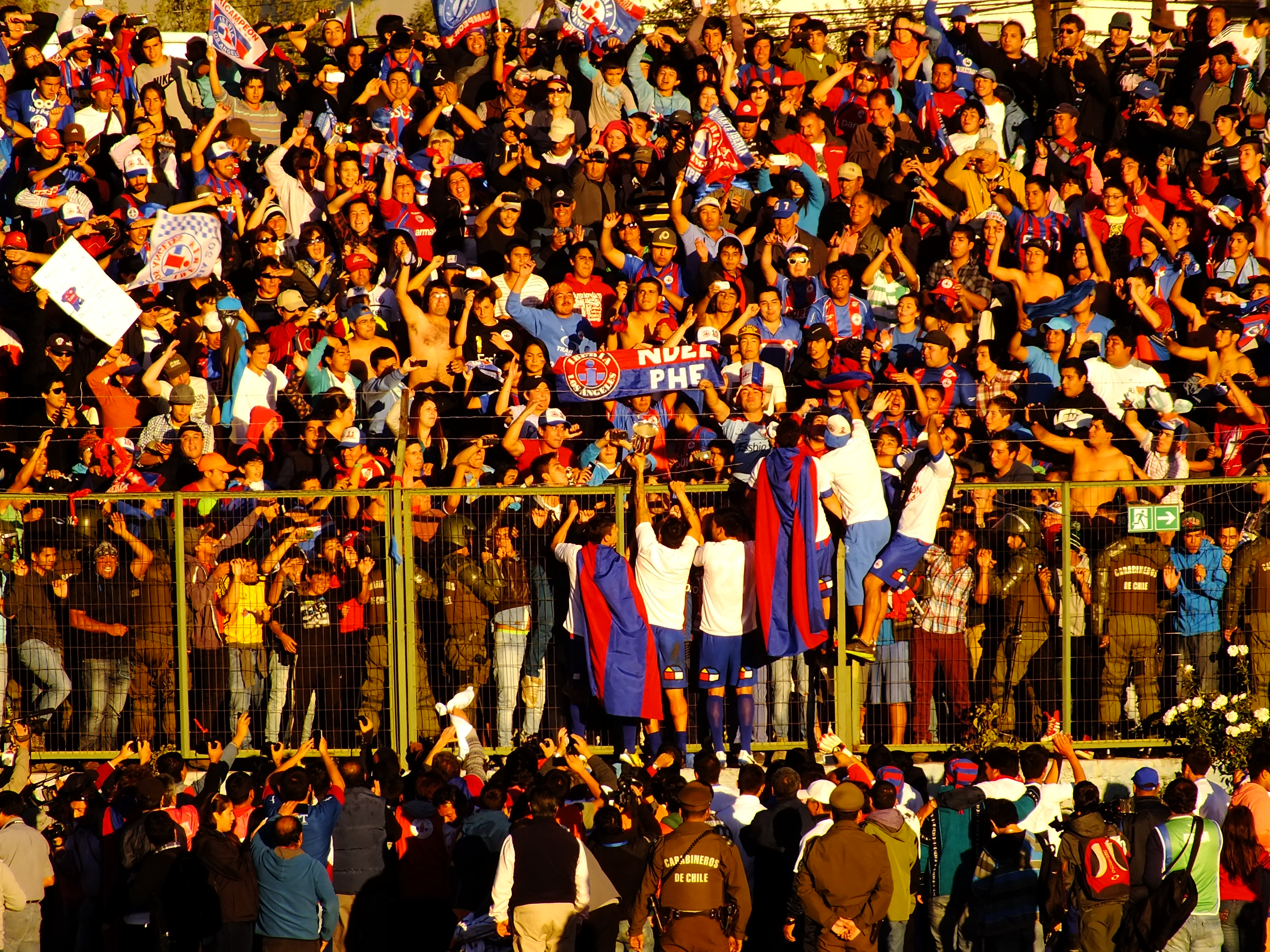 Vuelta Olímpica Iberiana